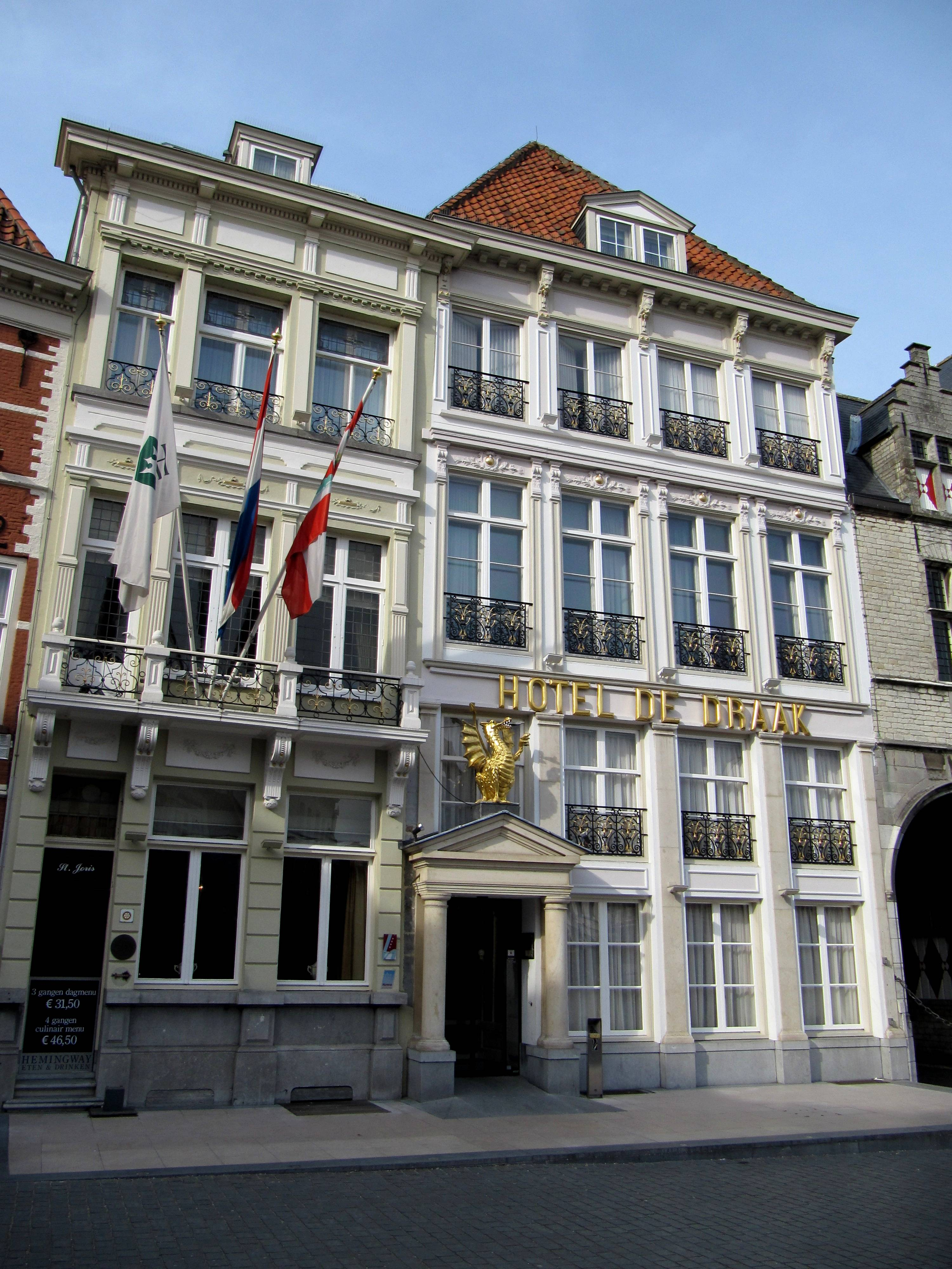 Bergen op Zoom Grote Markt 37-38 Sint Joris en De Draak. Grote Markt 37. Huis "St.Joris". Laat-middeleeuws pand thans met mansarde-dak. Gepleisterde lijstgevel, in de huidige vorm laatste kwart van de 19e eeuw. Grote Markt 38. Huis "De Draak". In oorsprong 15e eeuws pand